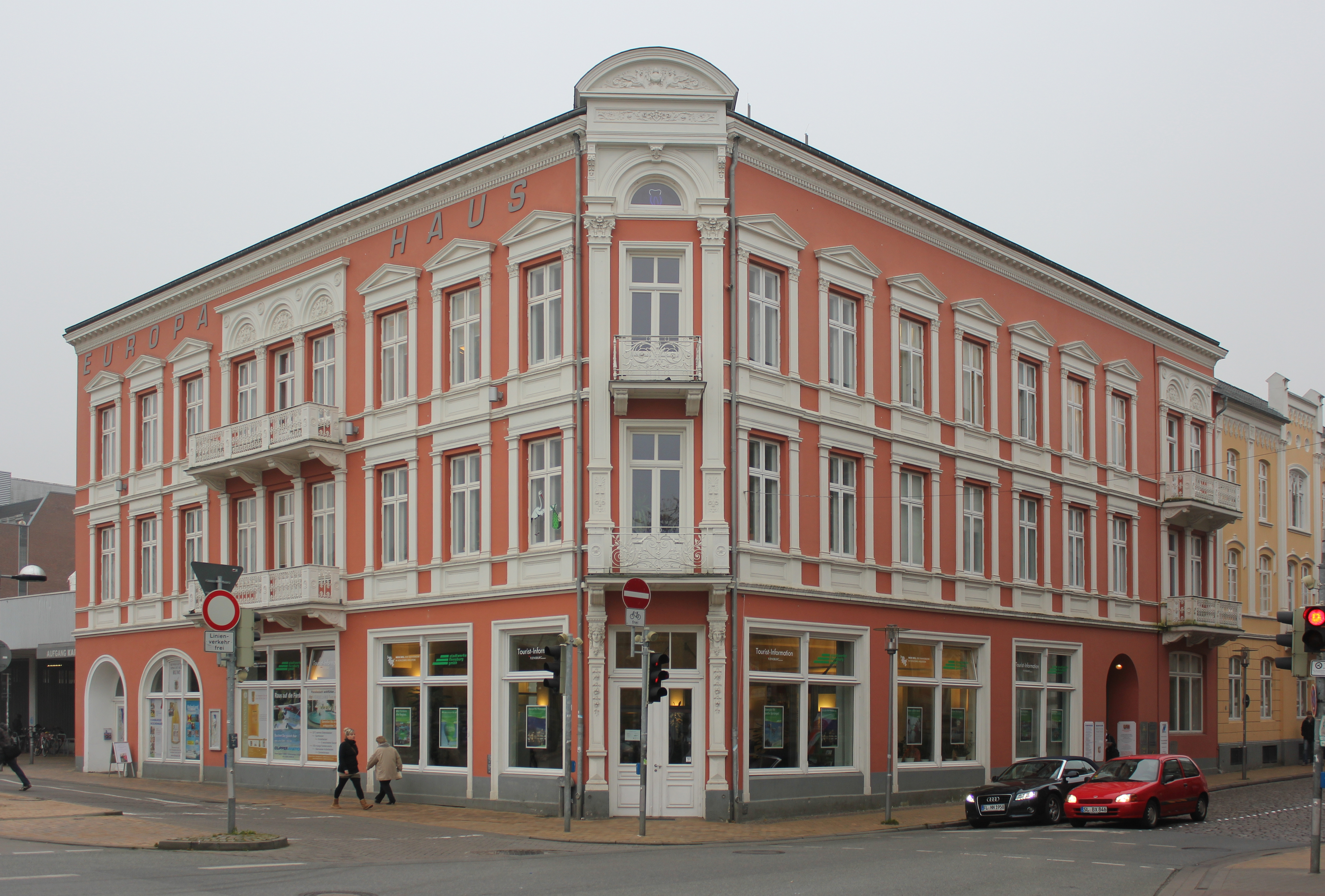 Europahaus in Flensburg (ehemaliges Europa Hotel) -- Rathausstraße 1-3